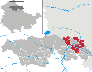 Verwaltungsgemeinschaft Mittelzentrum Artern in Thuringia - Kyffhäuserkreis